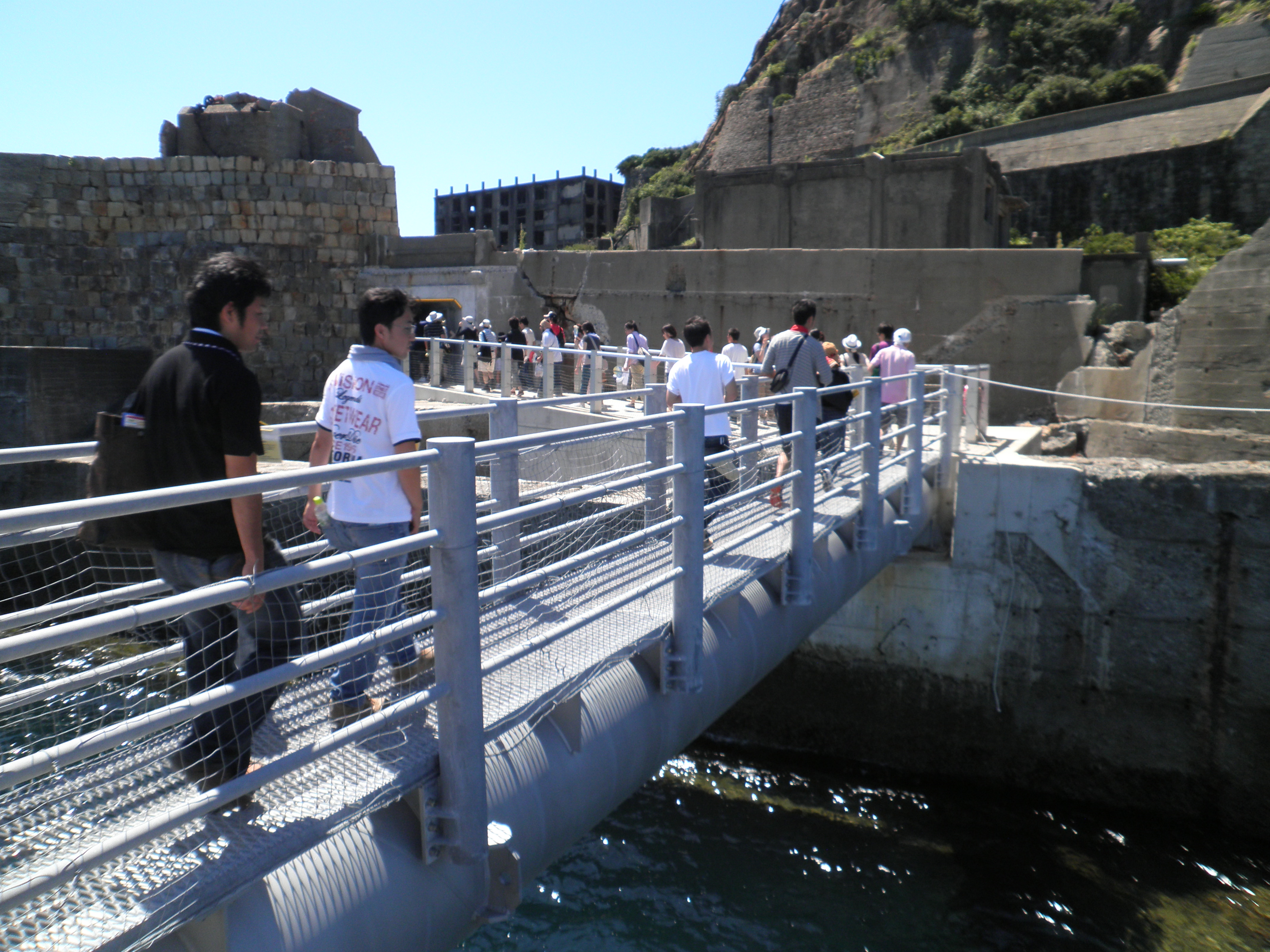 長崎県の端島(軍艦島)に上陸する観光客